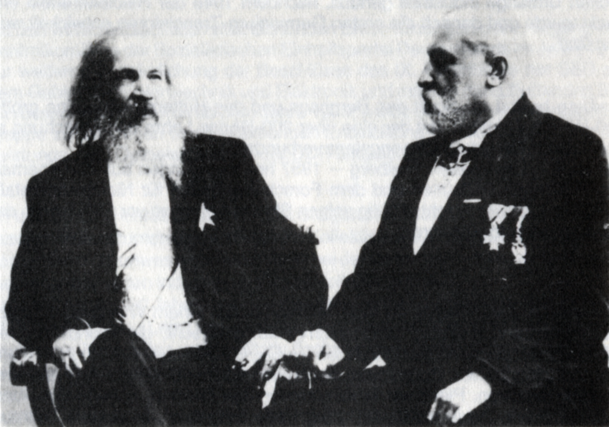 Clemens Winkler zusammen mit Dimitri Mendelejew während eines Besuchs in Berlin am 19.03.1900